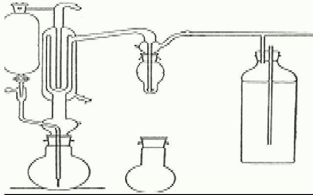 Nom:franzpaul1 license:own date:2010-05-06